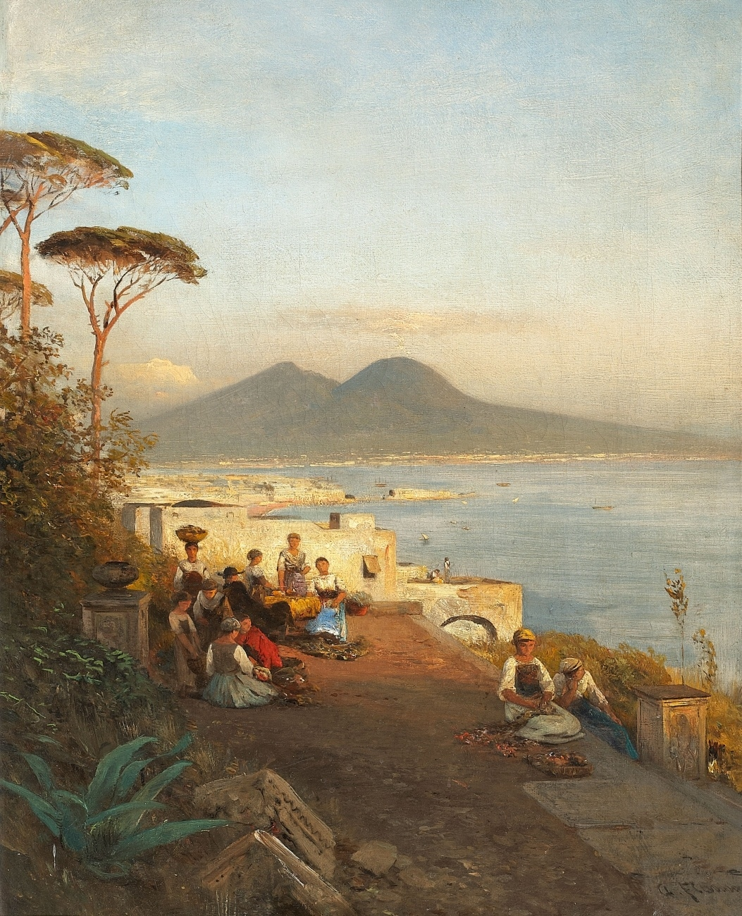 Golf von Neapel. Signiert unten rechts: A. Flamm. Öl auf Leinwand. 45,5 x 35 cm.